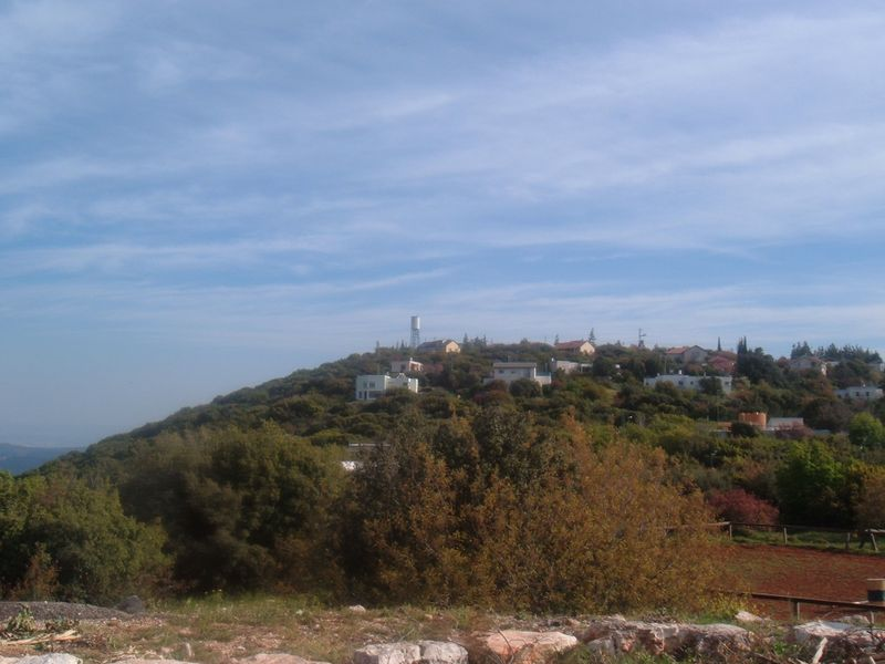 kamon, misgav, Israel. היישוב כמון במשגב